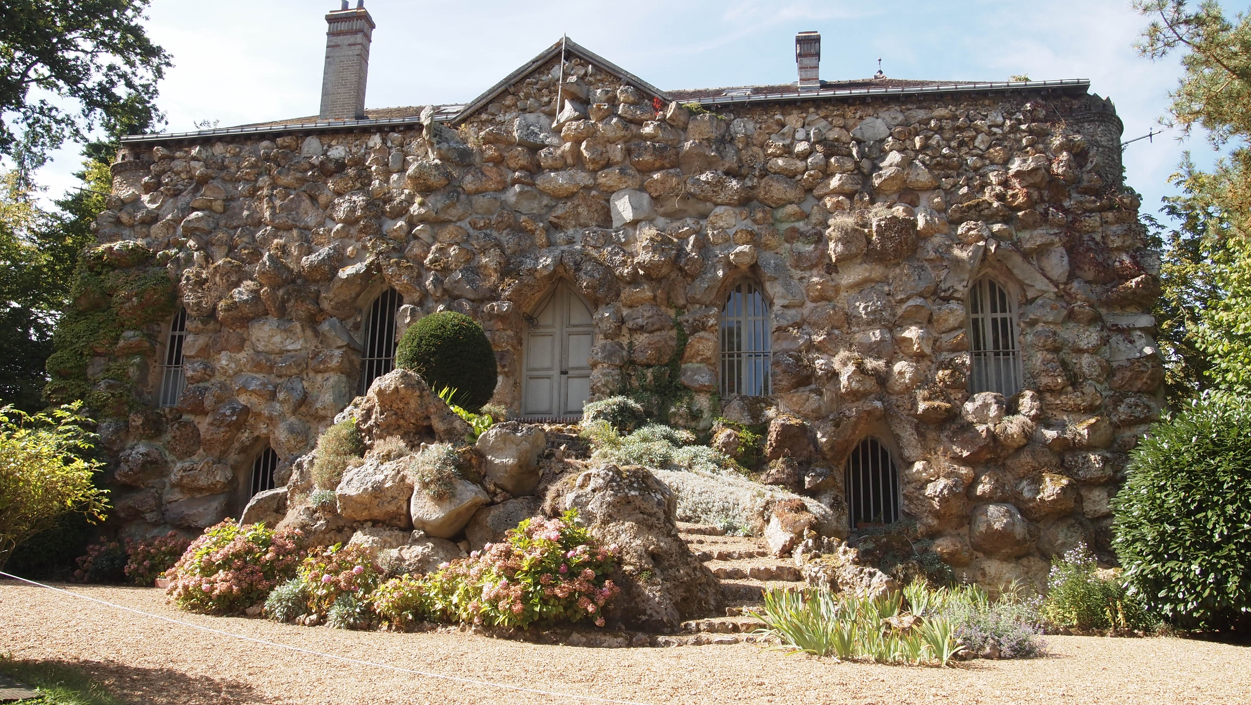 Manoir de Mirougrain- Illiers Combray- Eure et Loir